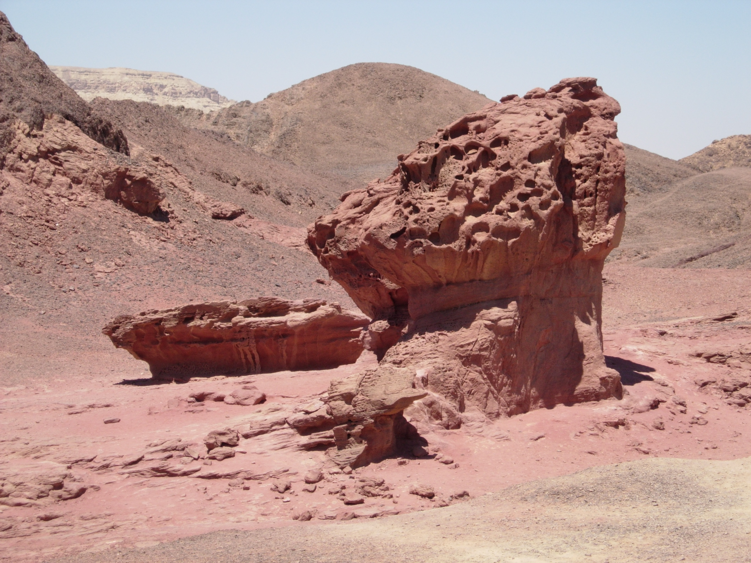 Timna Valley, Negev Desert, Israel.